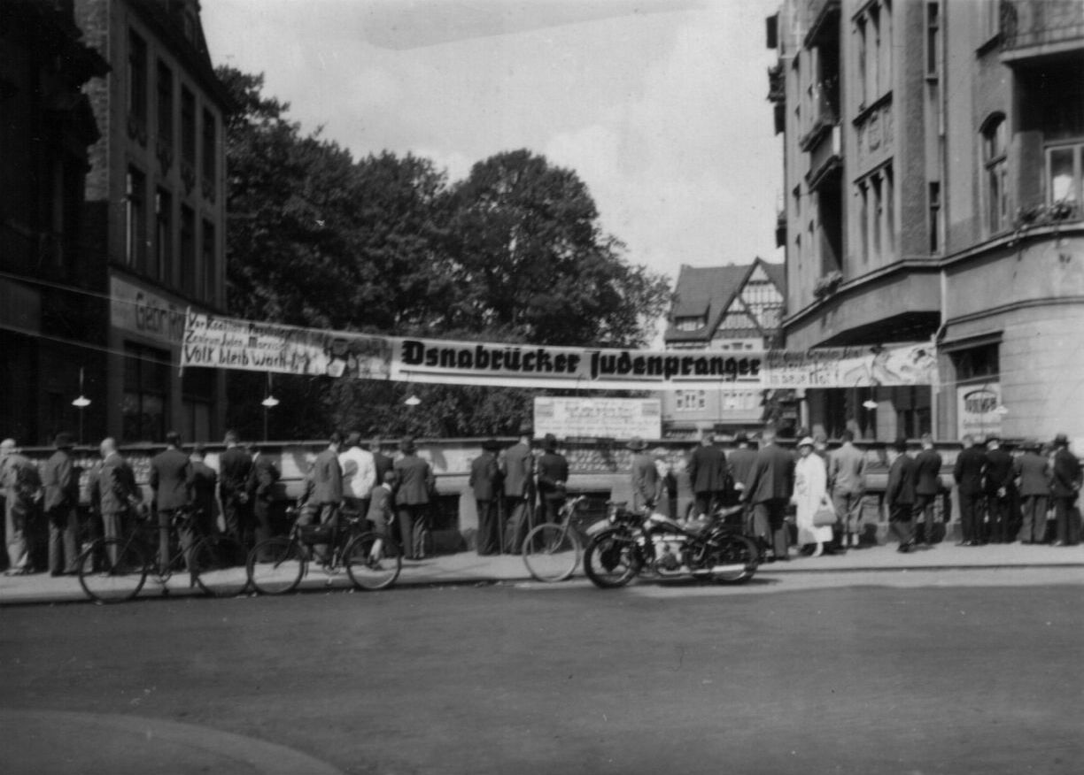 Osnabrücker Judenpranger, aufgenommen ??, Sept 1934, s/w 6 x 9